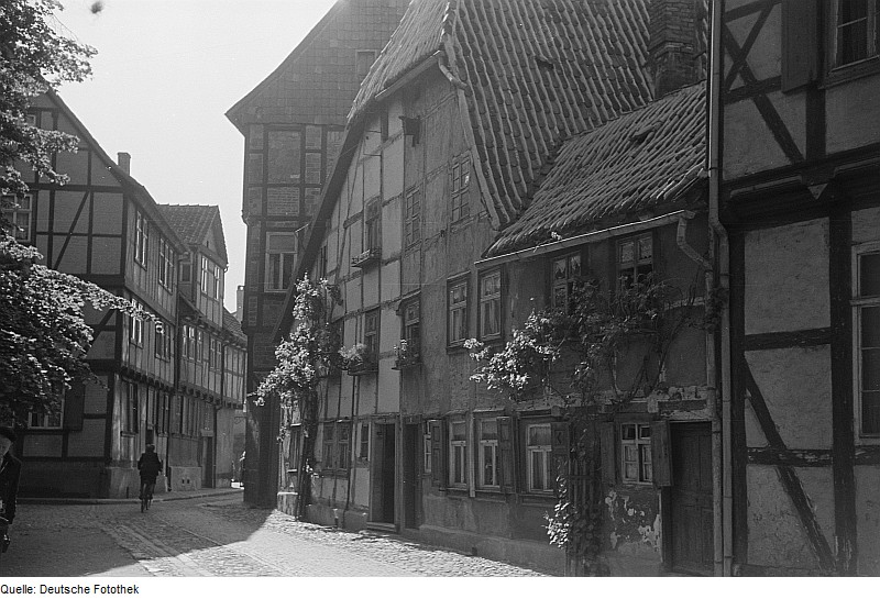 Original image description from the Deutsche Fotothek Gasse mit Fachwerkhäusern in der Altstadt